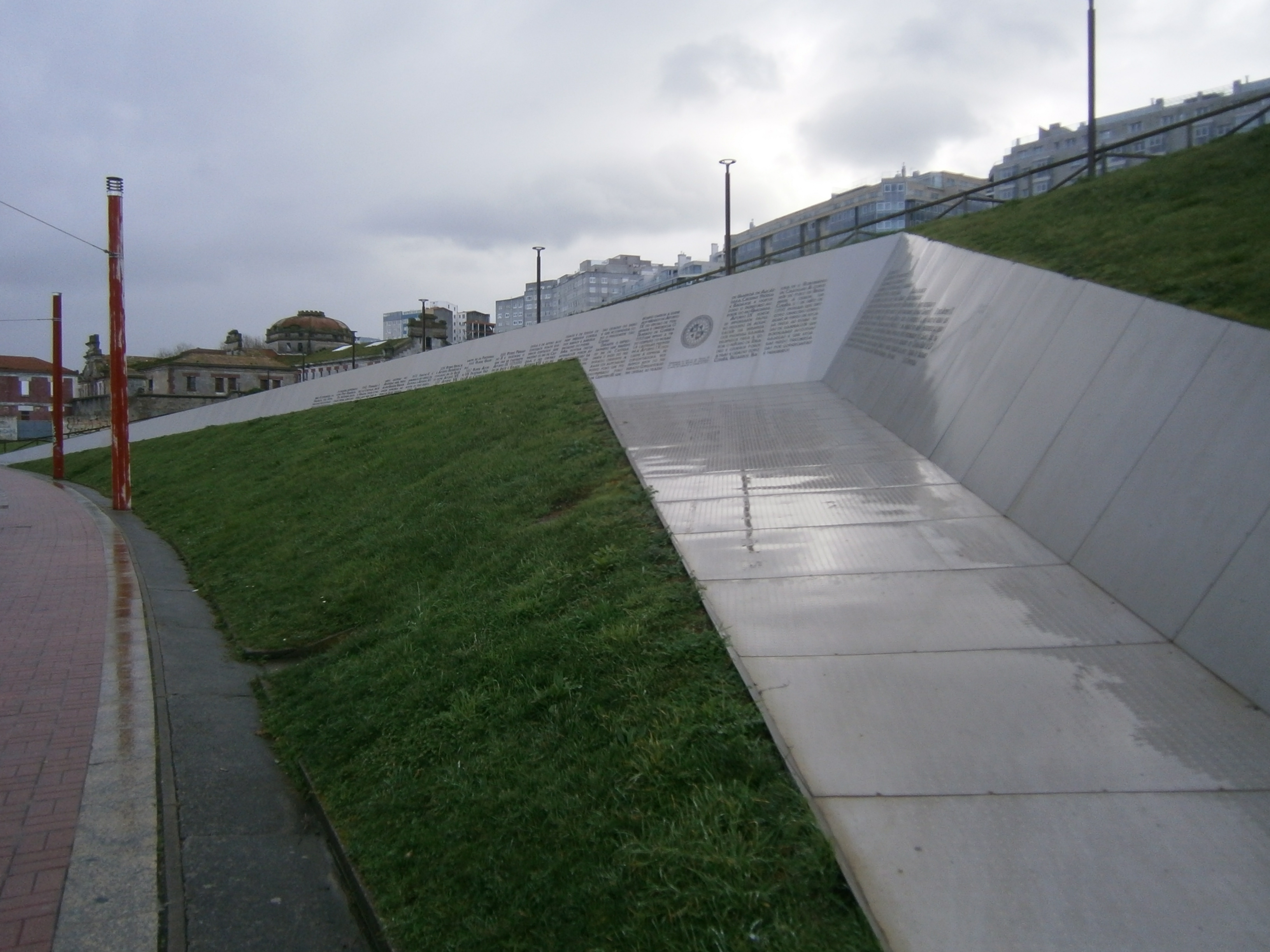 Monumento a Afonso IX na Coruña, obra de Juan Creus e Covadonga Carrasco a partir dunha idea de Isaac Díaz Pardo